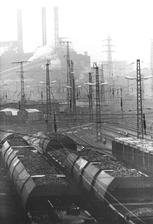 ADN-Matthias Hiekel 28.11.90 Dresden: Noch rauchen die Schornsteine des Heizkraftwerkes Mitte in Dresden, doch die benötigte Kohle liegt in den Waggons auf dem Rangierbahnhof Friedrichstadt fest.